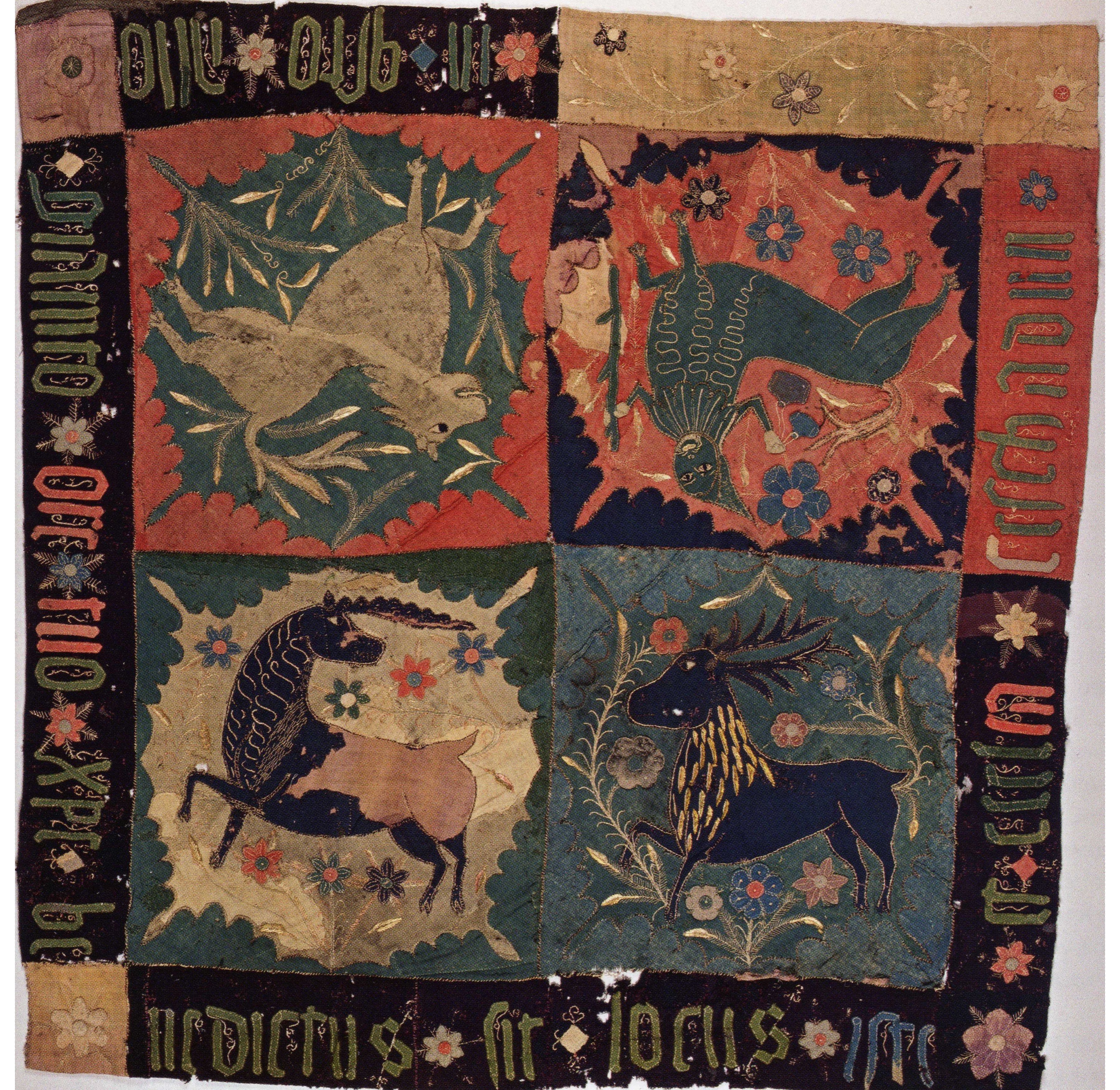 Altartuch mit Fabelwesen. Skandinavien (?), 135x130 cm, Wolle Intarsientechnik, Applikation. Rijkmuseum, Amsterdam. Dauerleihgabe aus Privatbesitz o.Nr.